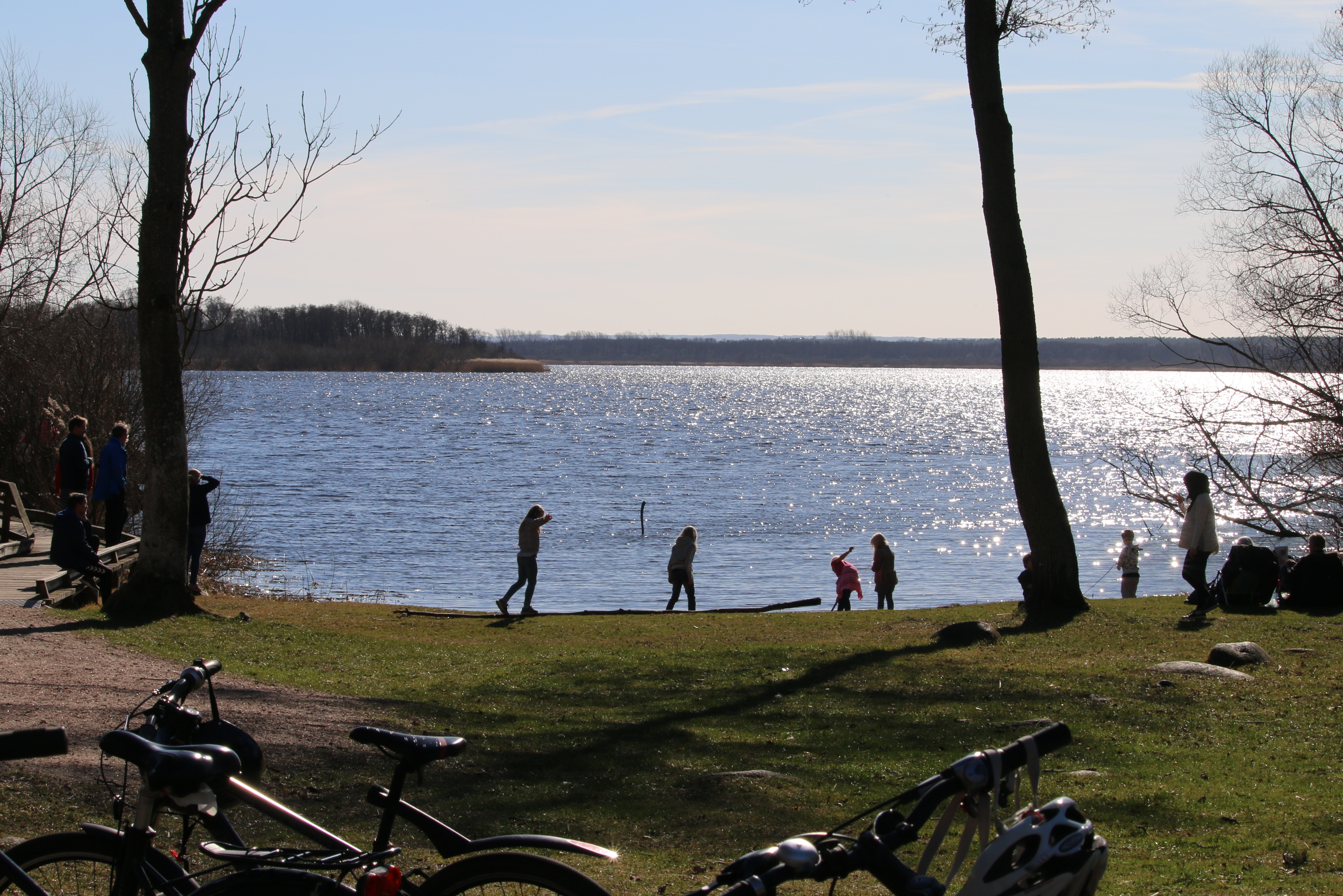 Hammarsjön